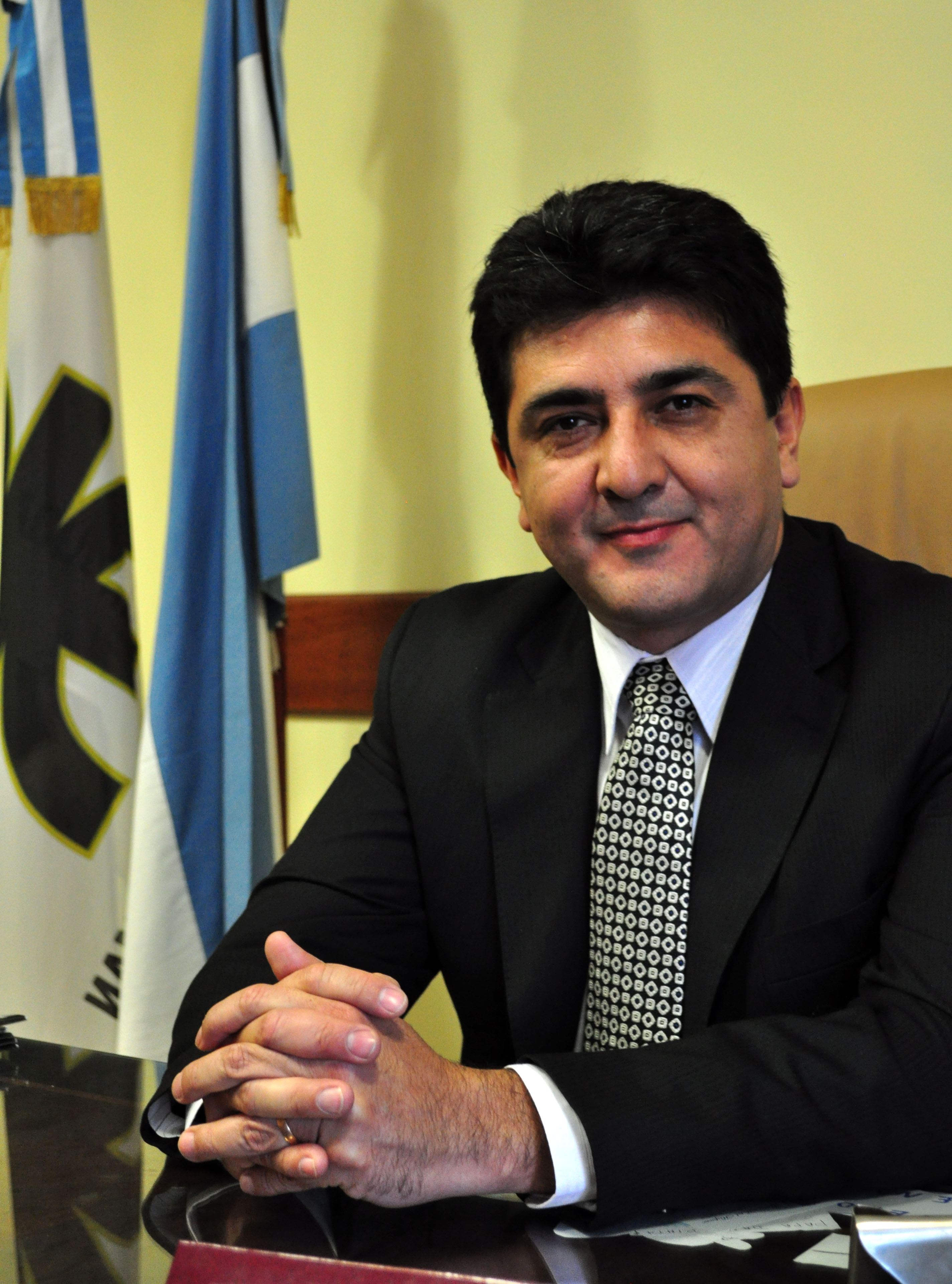 Decano de la UTN - Facultad Regional Tucumán gestión 2007 - 2011 / 2011 - 2015